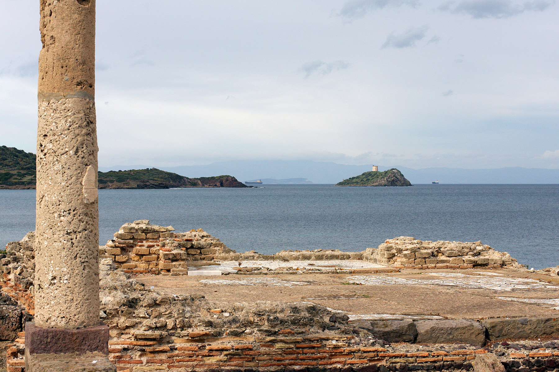 Scavi di Nora